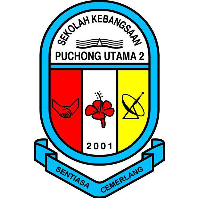 Lencana Sekolah Kebangsaan Puchong Utama 2